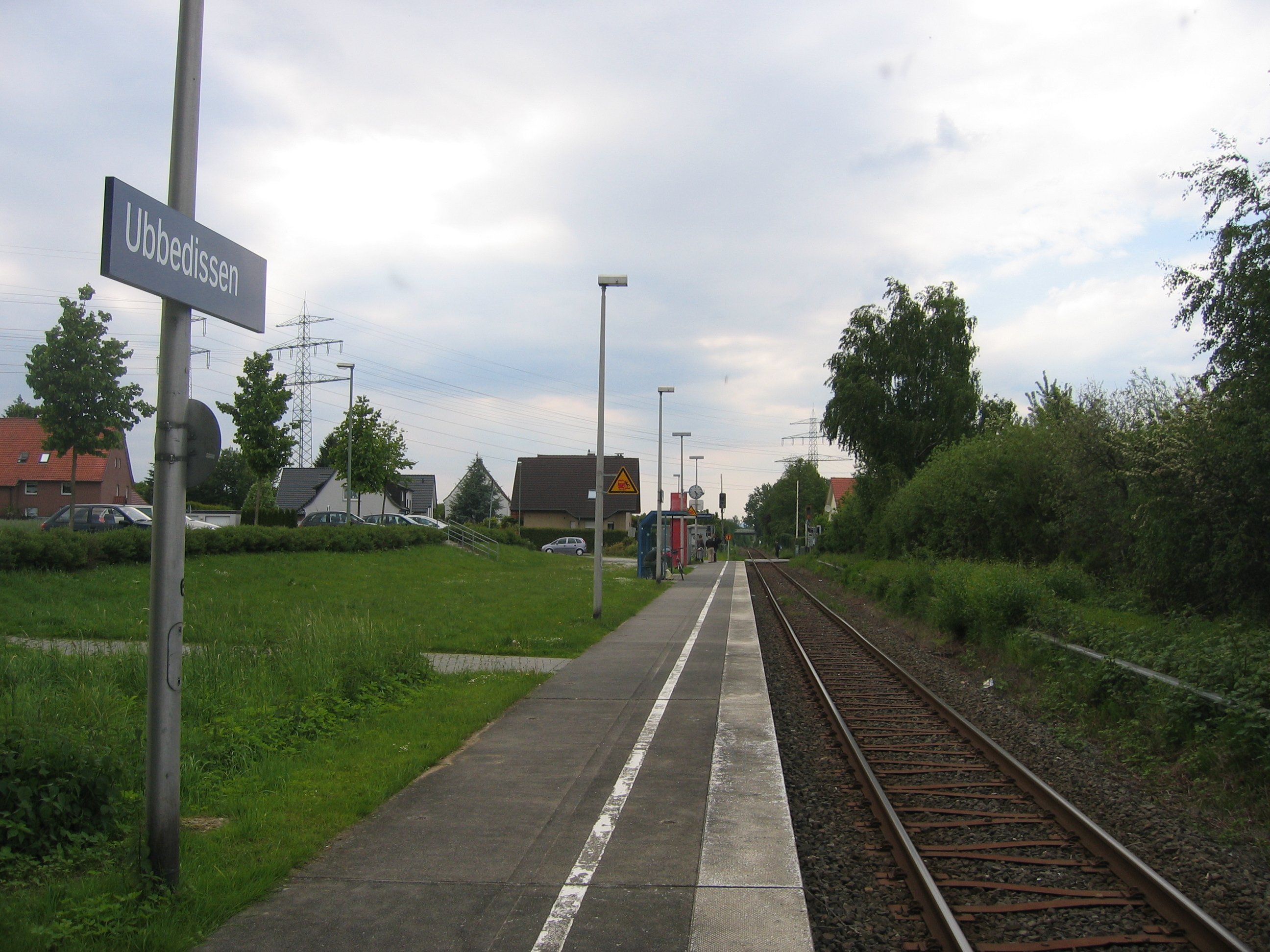 Bahnhof Ubbedissen in Bielefeld, NRW